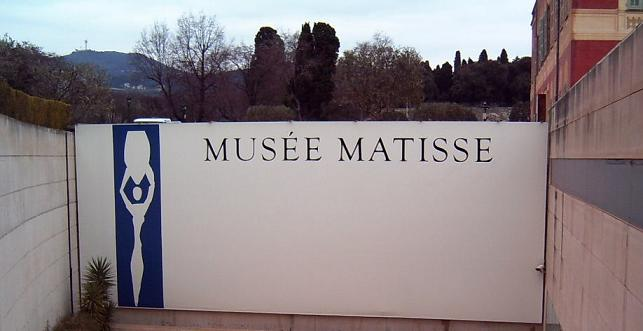 Limburgs: Ingank van 't museum van Henri Matisse in Nice (Cimiez)